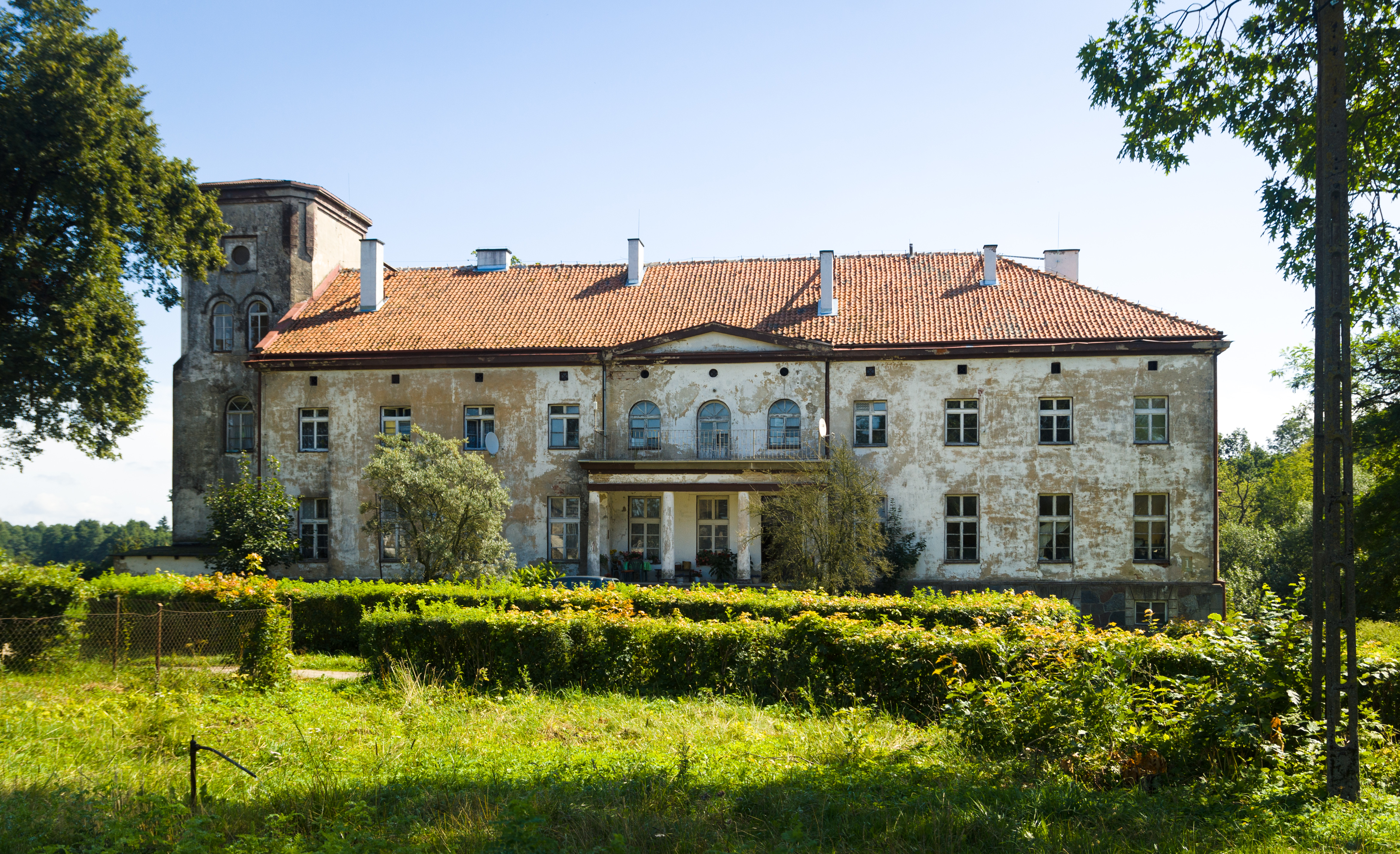 Nerwiki - pałac z przełomu XVIII i XIX wieku.